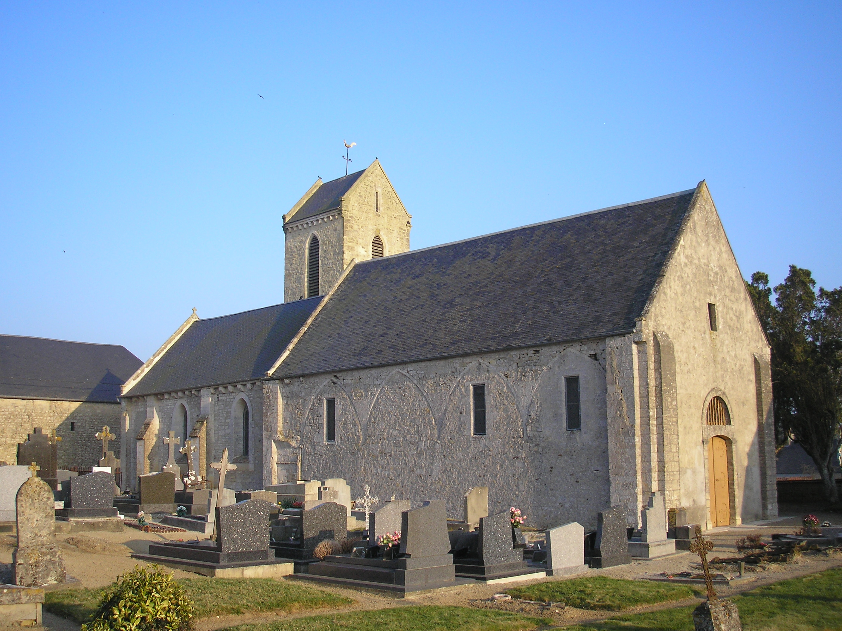 Surrain (Normandie, France). L'église Saint-Martin.